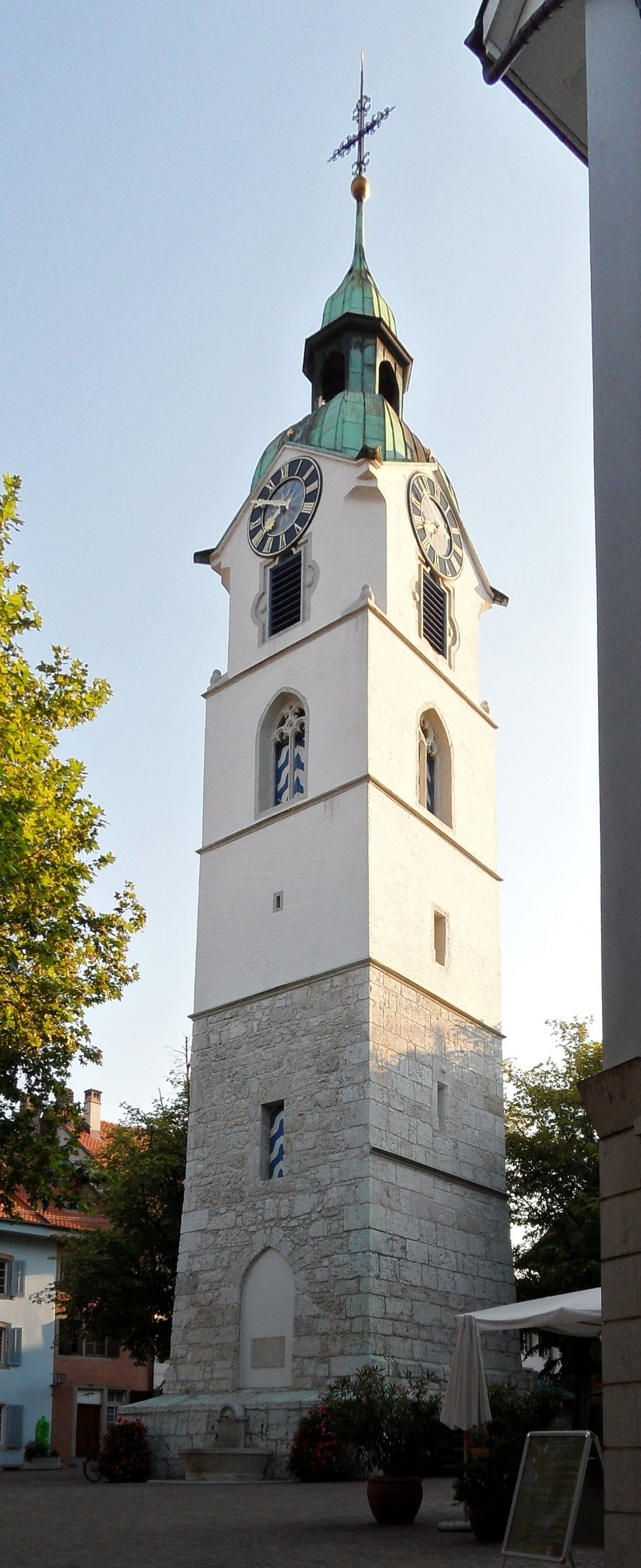 Stadtturm von Olten, Kanton Solothurn, Schweiz (früherer Kirchturm einer 1844 abgerissenen Kirche)